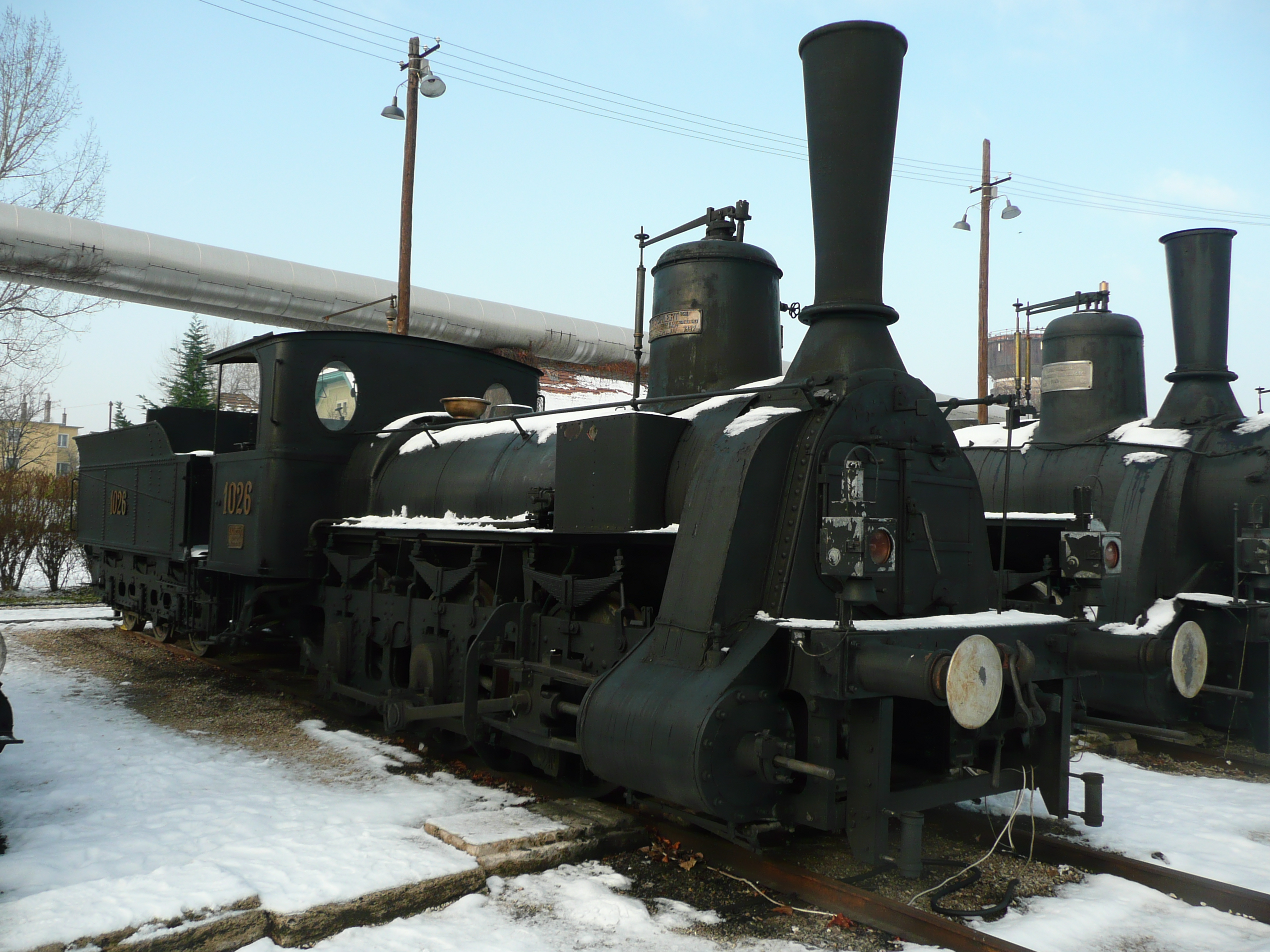 MAV 341.012 im Bahnpark Budapest